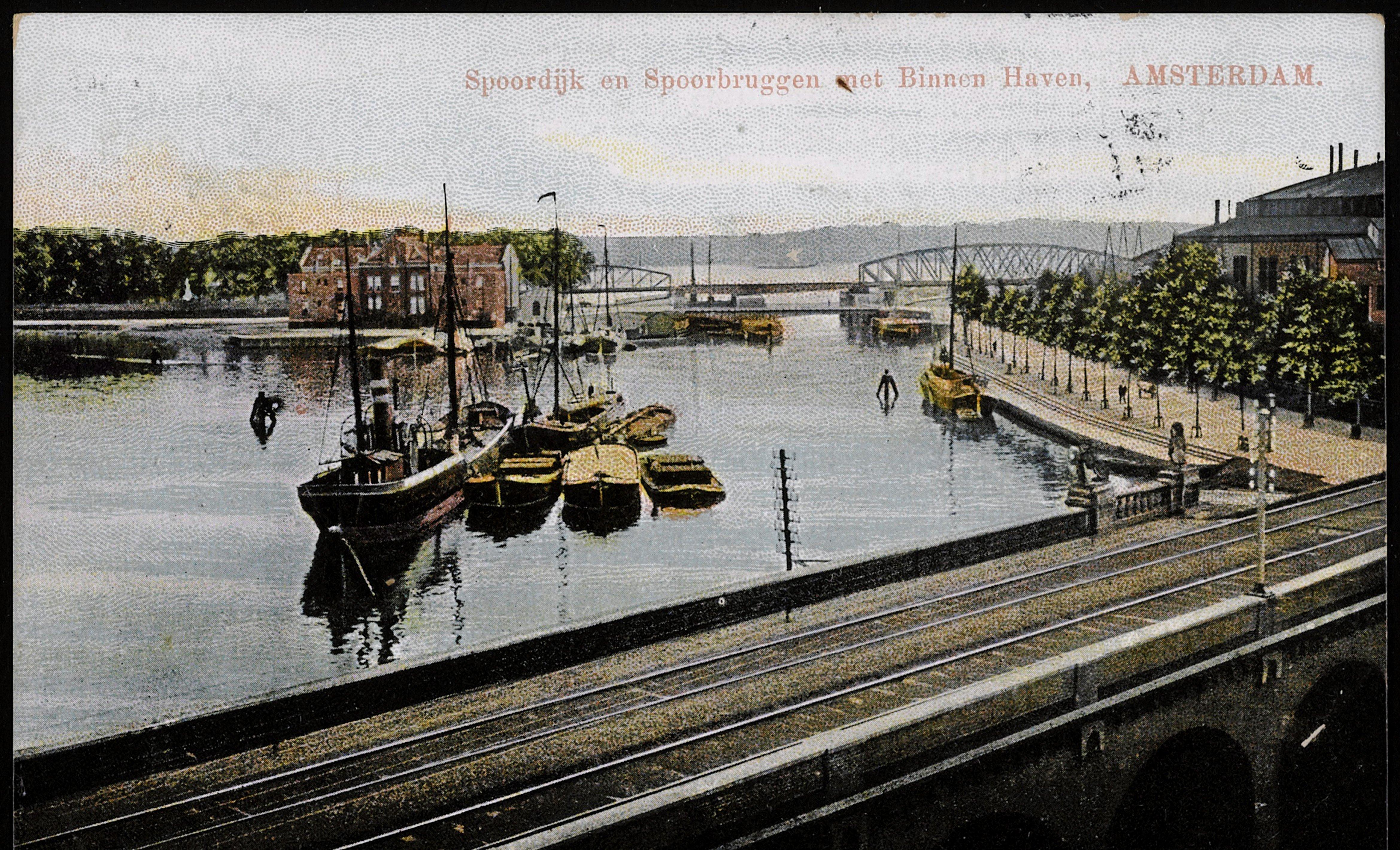 Beschrijving Westerdok met de spoorlijn langs de Haarlemmer Houttuinen, rechts de Westerdokskade Op de achtergrond het IJ met links de Westerdoksdijk. Documenttype prentbriefkaart Vervaardiger Onbekend Anoniem Collectie Collectie Stadsarchief Amsterdam: prentbriefkaarten Datering 1909 Geografische naam Westerdok Inventarissen Afbeeldingsbestand PRKBB00280000001